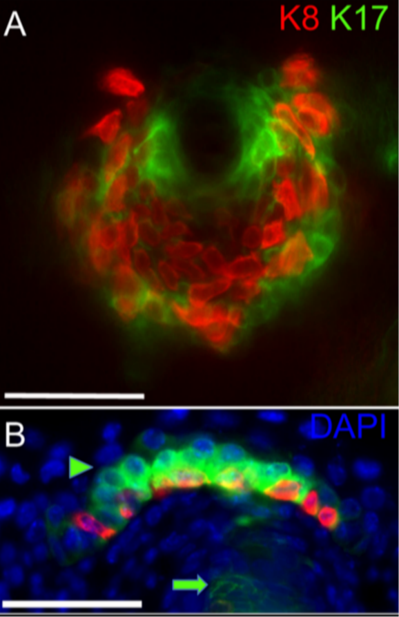 Fig. 4. La señalización intraepitelial de Shh es necesaria para el desarrollo de TD MC. A) tinción de montaje completo K8 y K17 en control. Vista paralela a la superficie: células de Merkel en rojo. B) tinción de secciones K8 y K17 en control y K14-Cre. Vista de un corte transversal. Punta de flecha, queratinocitos K17+ del domo TD. Flecha, K17+ es un folículo piloso. Barras de escala, 50 μm.